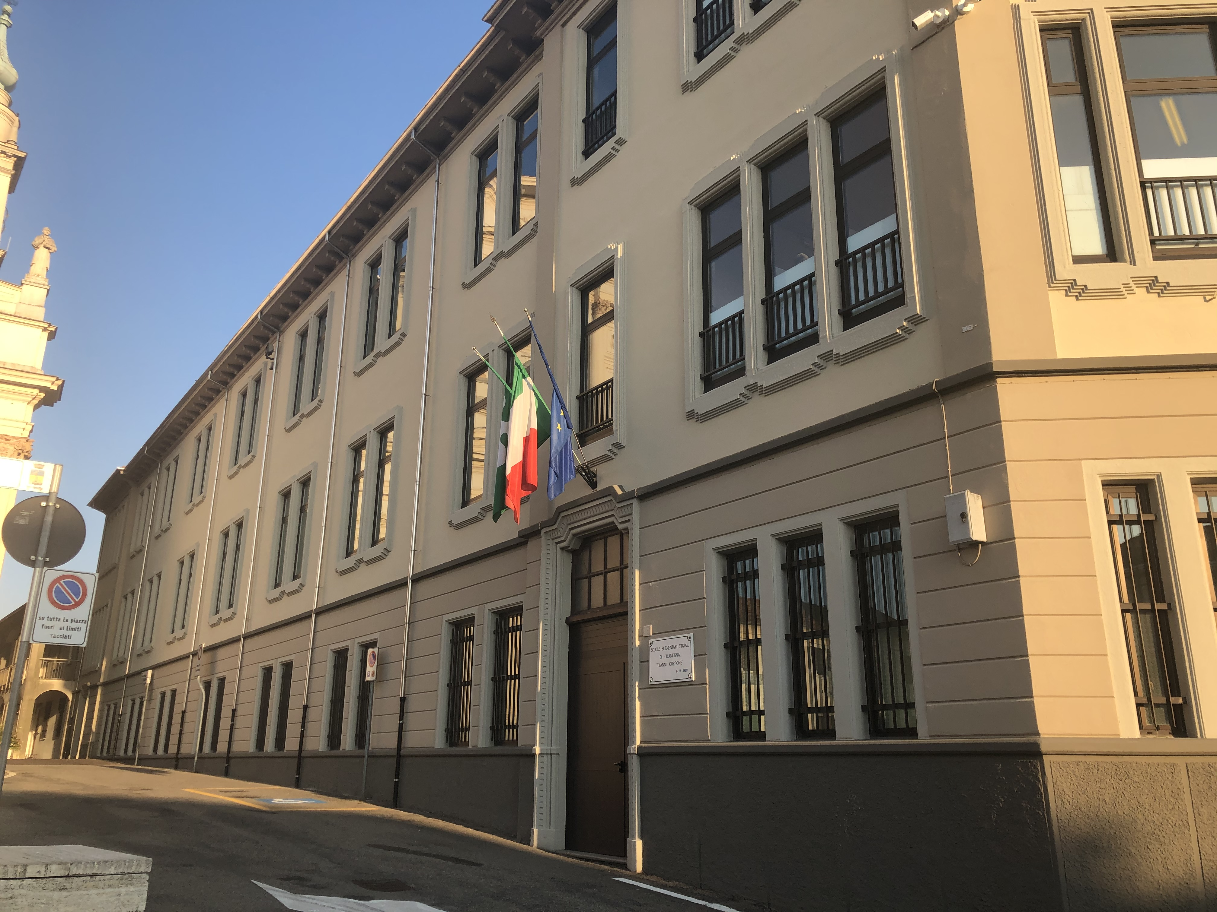 La scuola elementare di Cilavegna come si presenta oggi